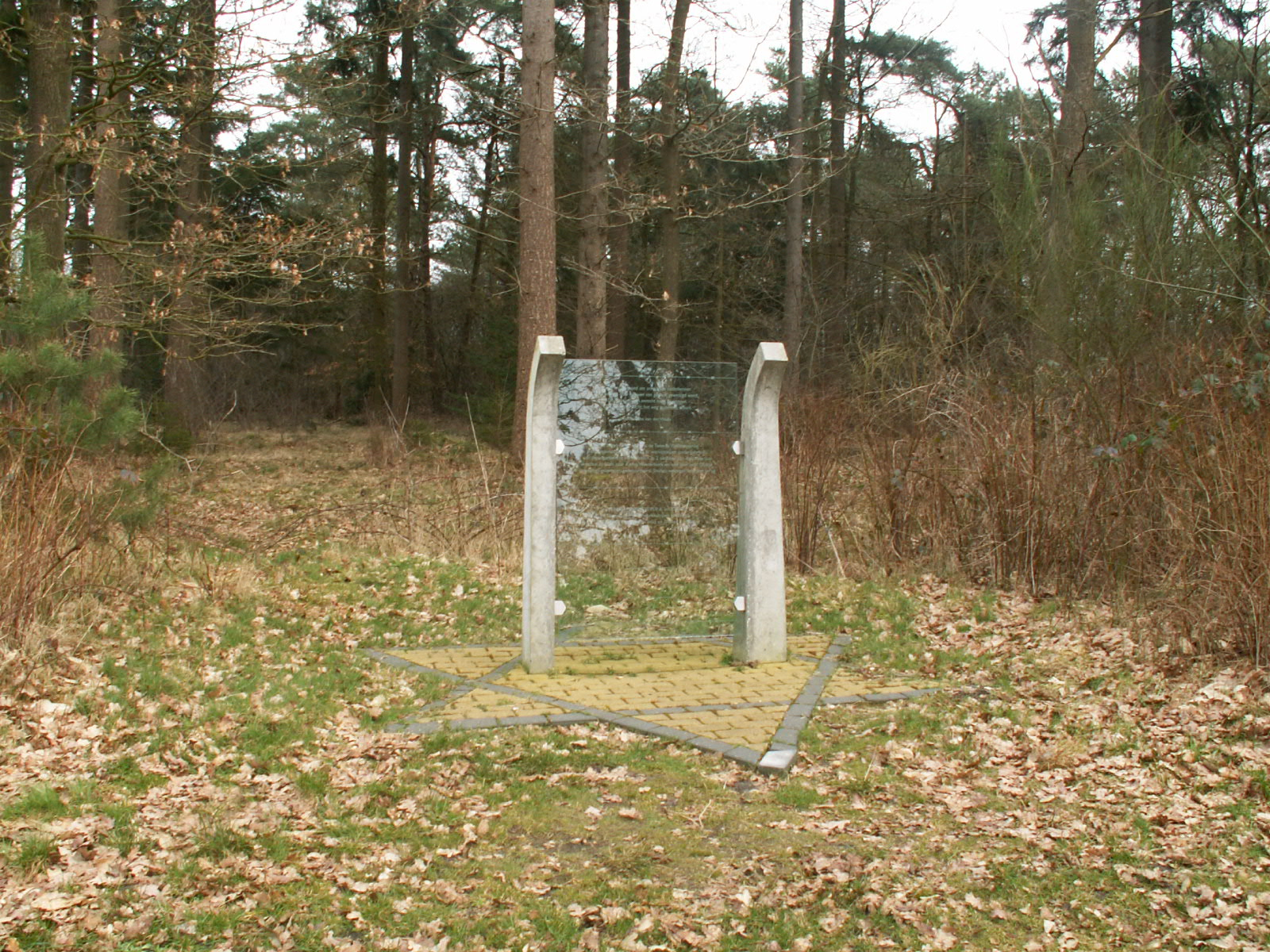 Monument Kamp Vledder Diever